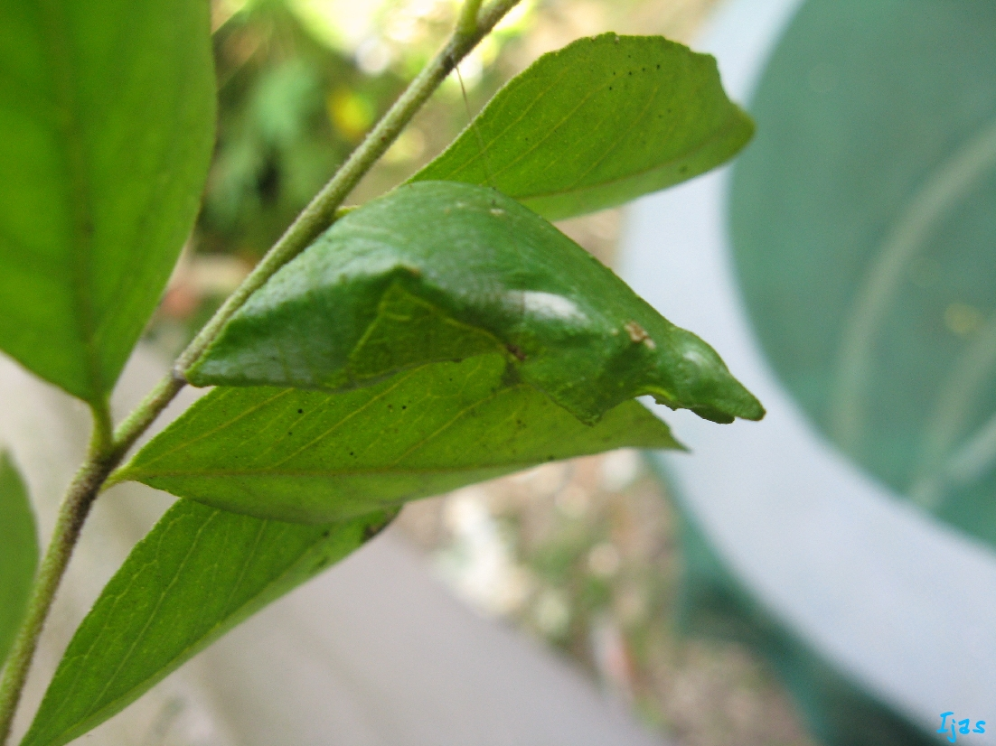 കറിവേപ്പിൽ മുട്ടയിട്ട നാരക്കാളി ശലഭത്തിന്റെ പ്യൂപ്പയാണ് ചിത്രത്തിൽ കാണുന്നത്. 10 ദിവസം കഴിയുമ്പോൾ ശലഭം പുറത്തുവരും.